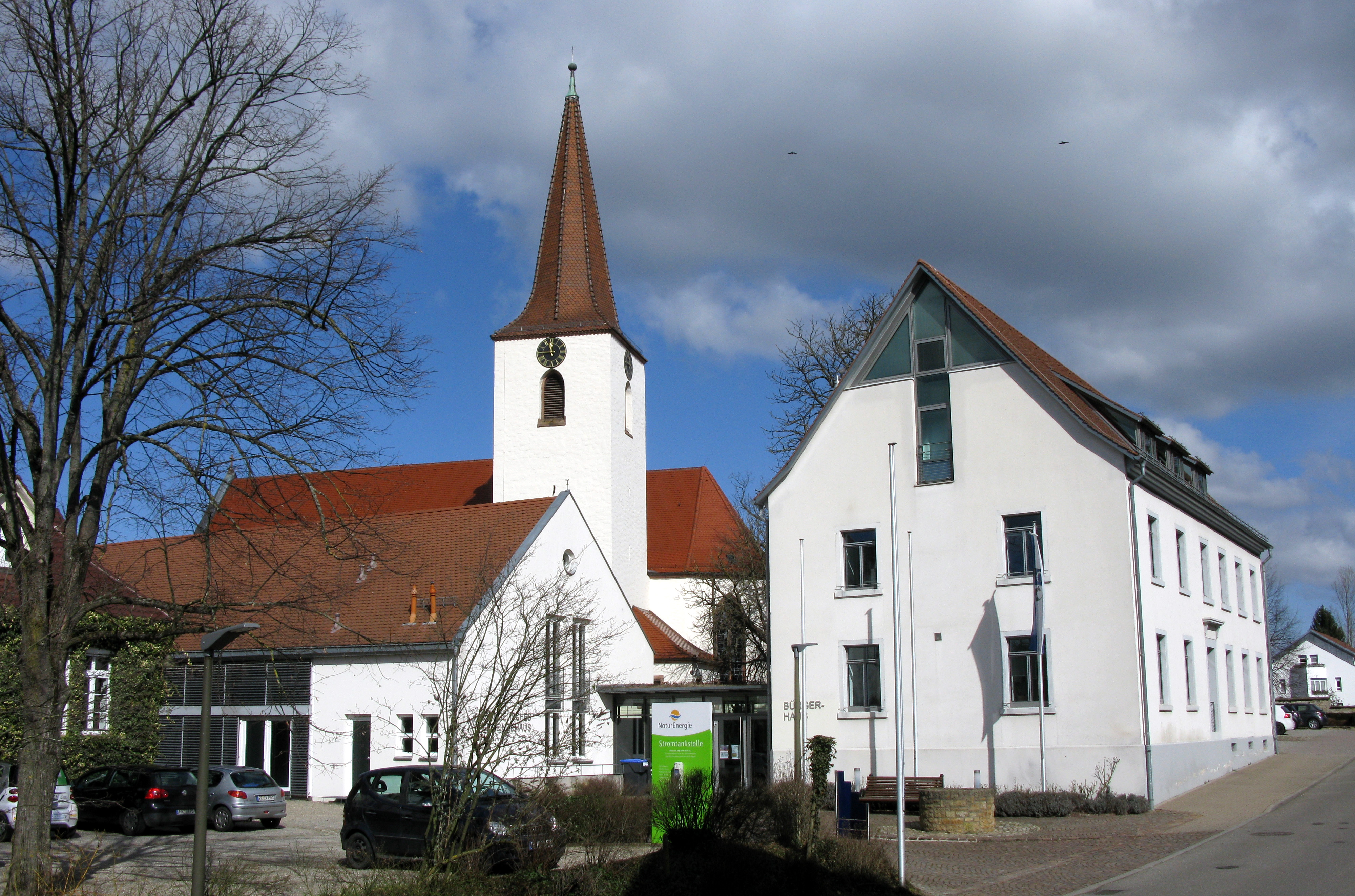 Evangelische Kirche von Schallstadt-Wolfenweiler mit Gemeindehaus (links) und Bürgerhaus (rechts)